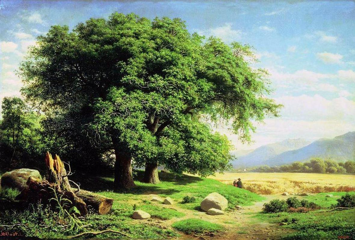 Вид в Нормандии (Летний день). Клодт, Михаил Константинович. 1860. Холст, масло. 63 x 91.4. Ярославский художественный музей